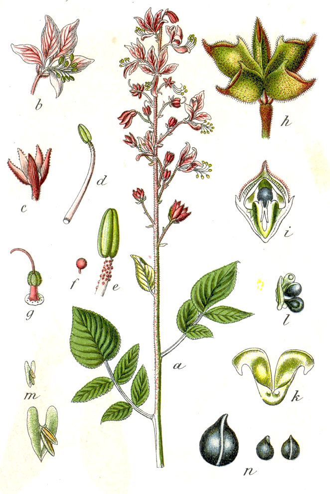 Dictamnus albus L., syn. Dictamnus generalis E.H.L.Krause Original Caption Weisser Diptam, Dictamnus generalis